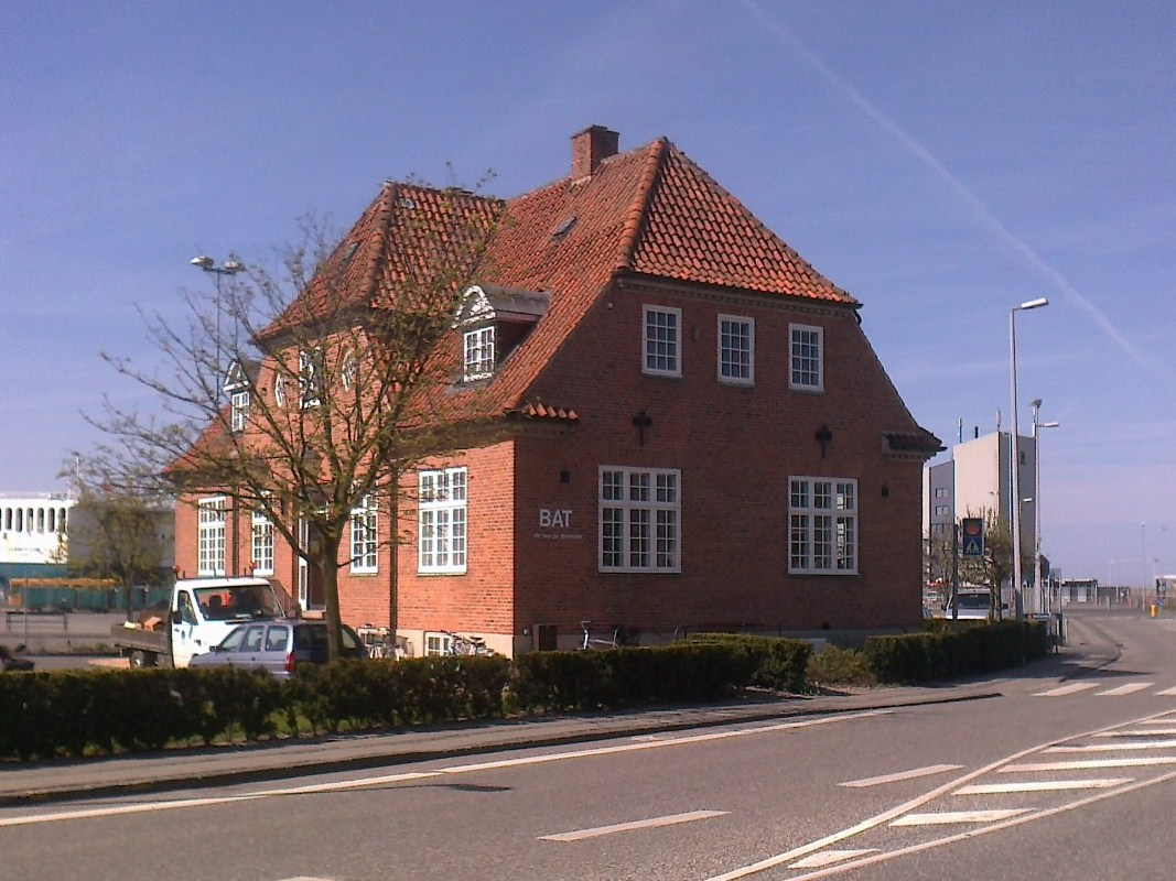 De Bornholmske Jernbaners Administrationsbygning